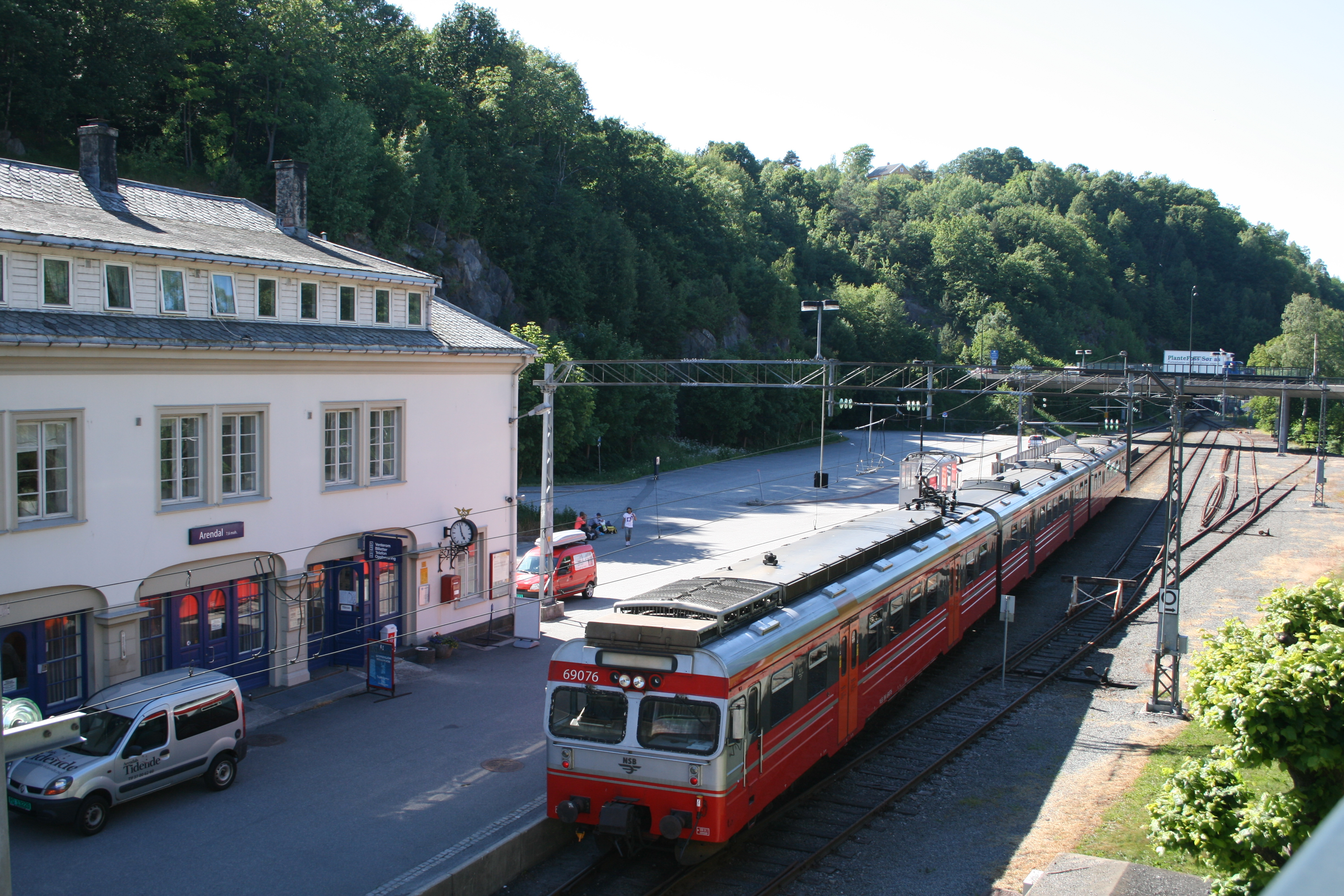 Arendal jernbanestasjon o